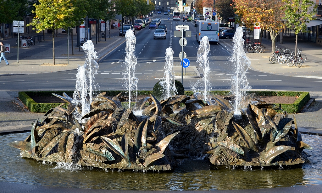 Braunschweig: Der Cimiotti-Brunnen vor dem Staatstheater Braunschweig. Blickrichtung Westen, den Steinweg hinunter.